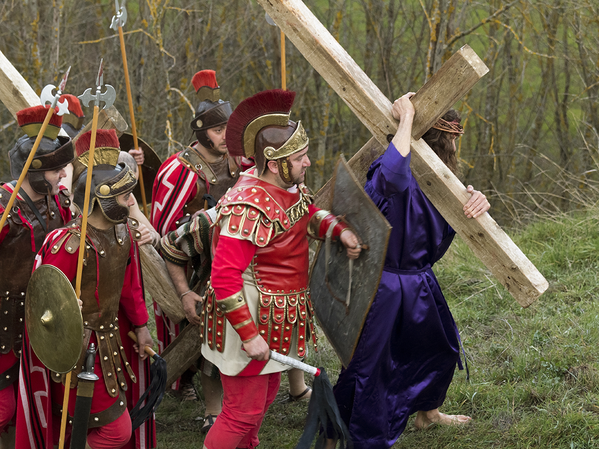 Vía Crucis del atleta Carmelo de la Fuente interpretando a Jesús